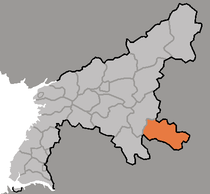 Map of Chongjin, Yangdok-namdo, DPRK, 2006